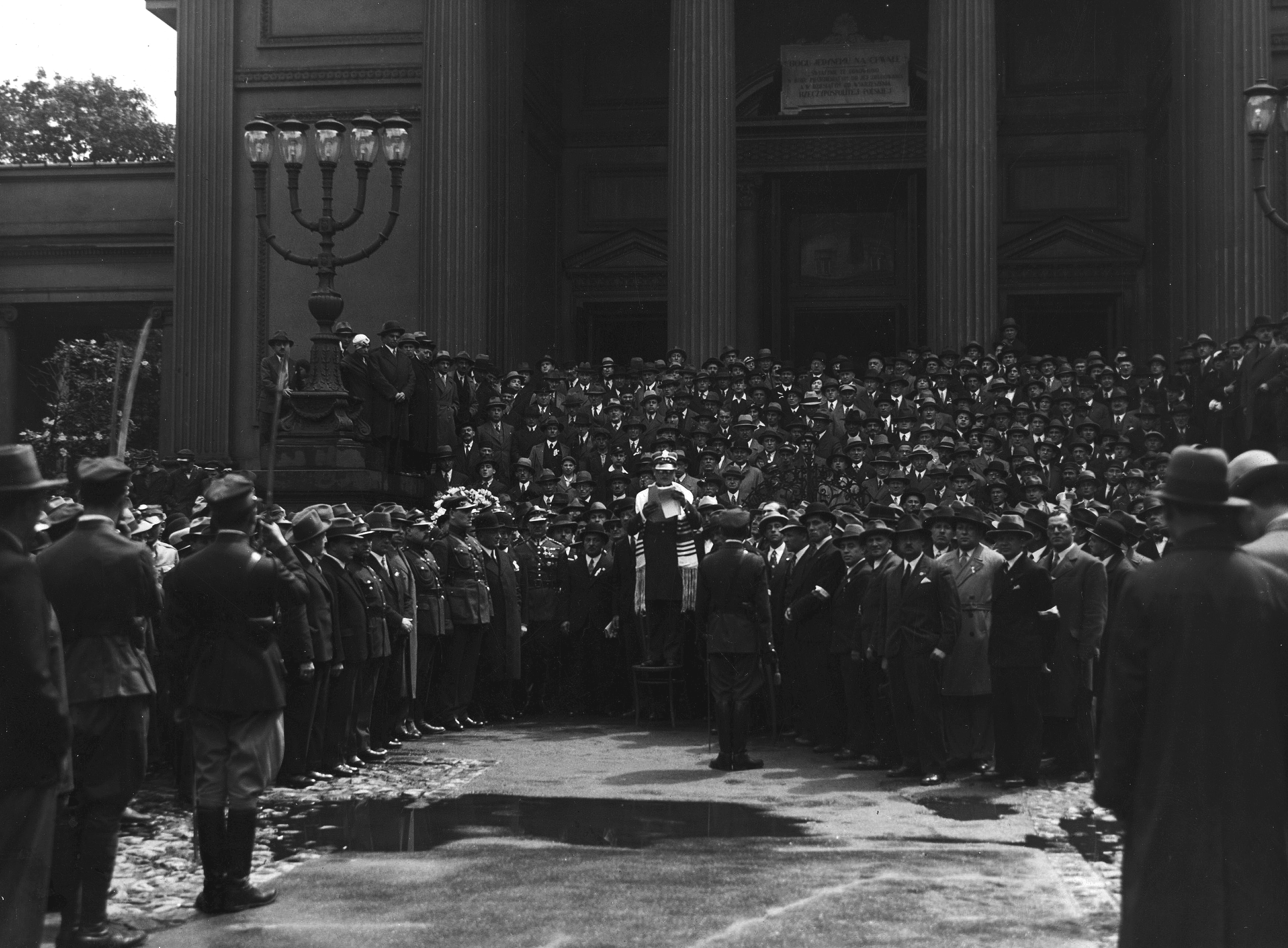 Rabin Baruch Steinberg przemawiający przed Wielką Synagogą na Tłomackiem w czasie apelu poległych zorganizowanego przez Związek Żydów Uczestników Walk o Niepodległość Polski